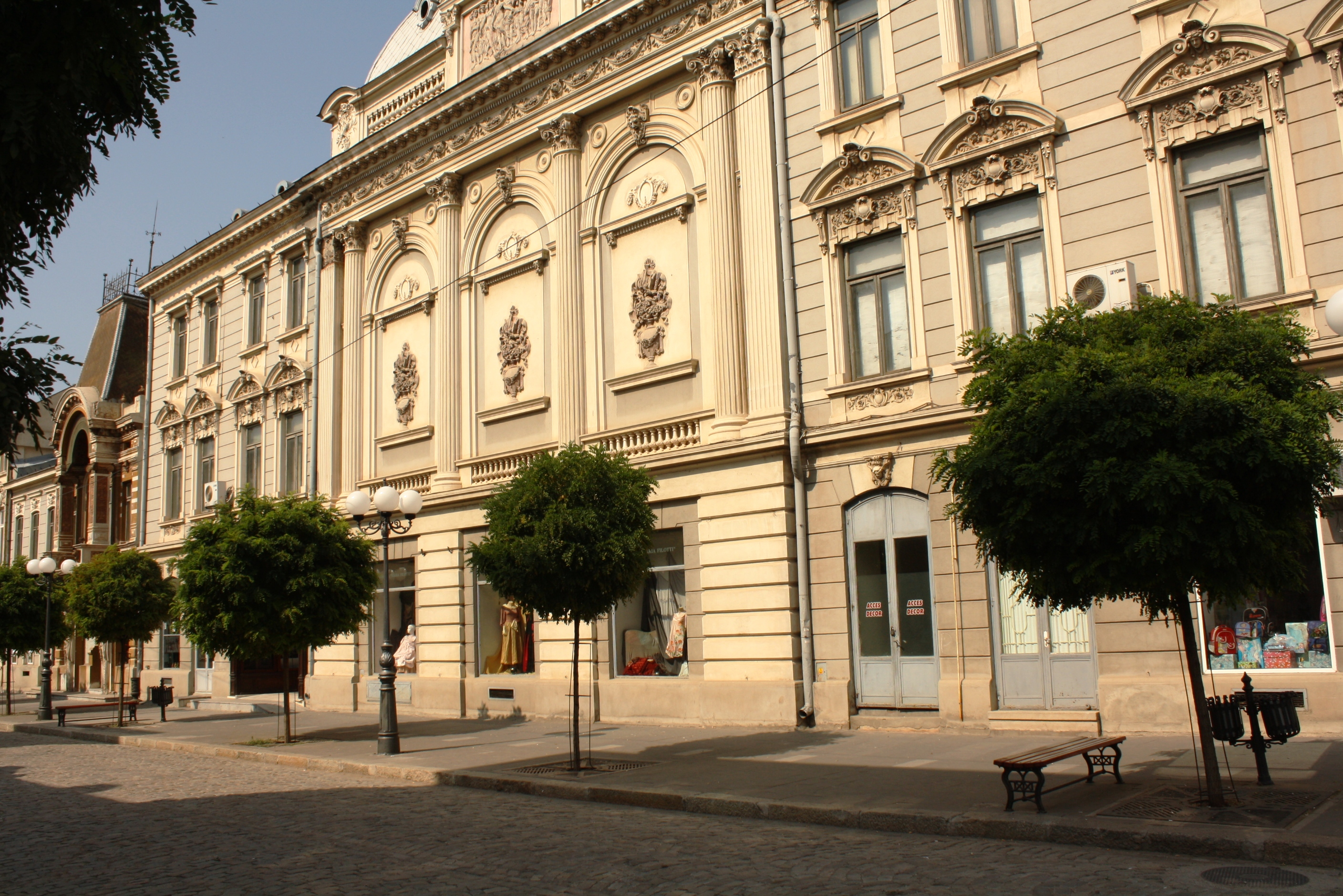 Teatrul " Rally"(1896), azi Teatrul "Maria Filotti", Str. Eminescu Mihai 2, Braila